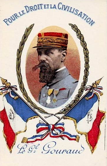 Gouraud, Pour le Droit et la Civilisation, 1914-1918